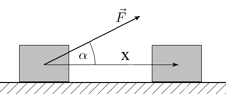 Esquema amb elements que defineixen el treball mecànic